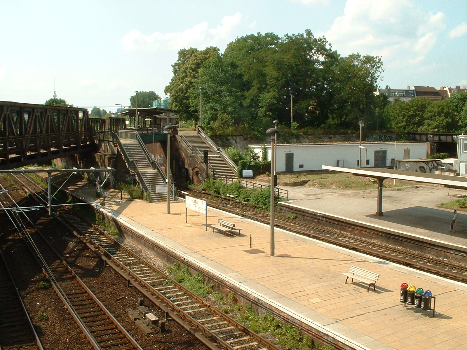 Die Bahnhofsausfahrt in Richtung Westen des Bahnhofs Ostkreuz, Berlin.